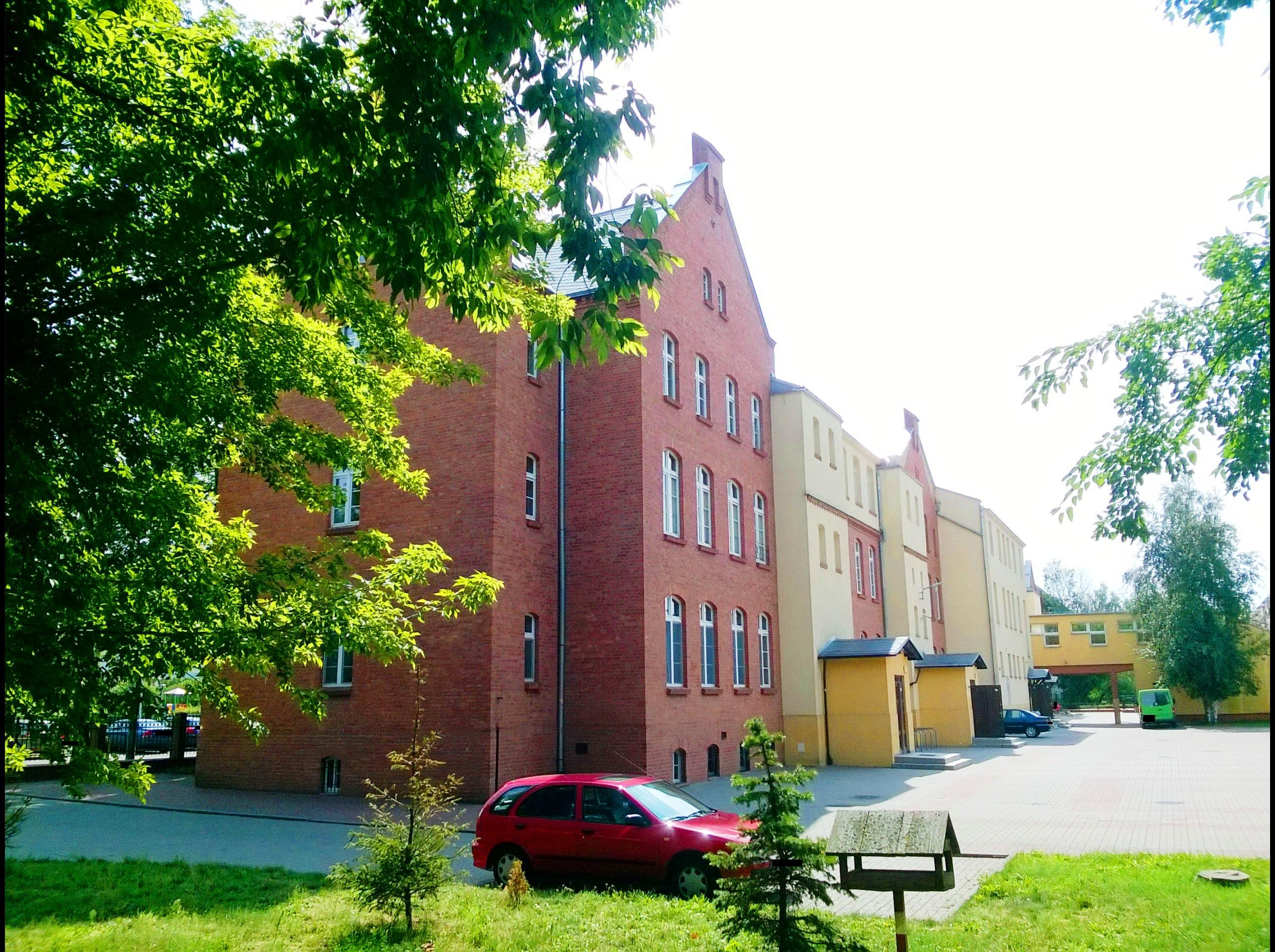 Budynek Szkoły Podstawowej nr 6 w Toruniu1